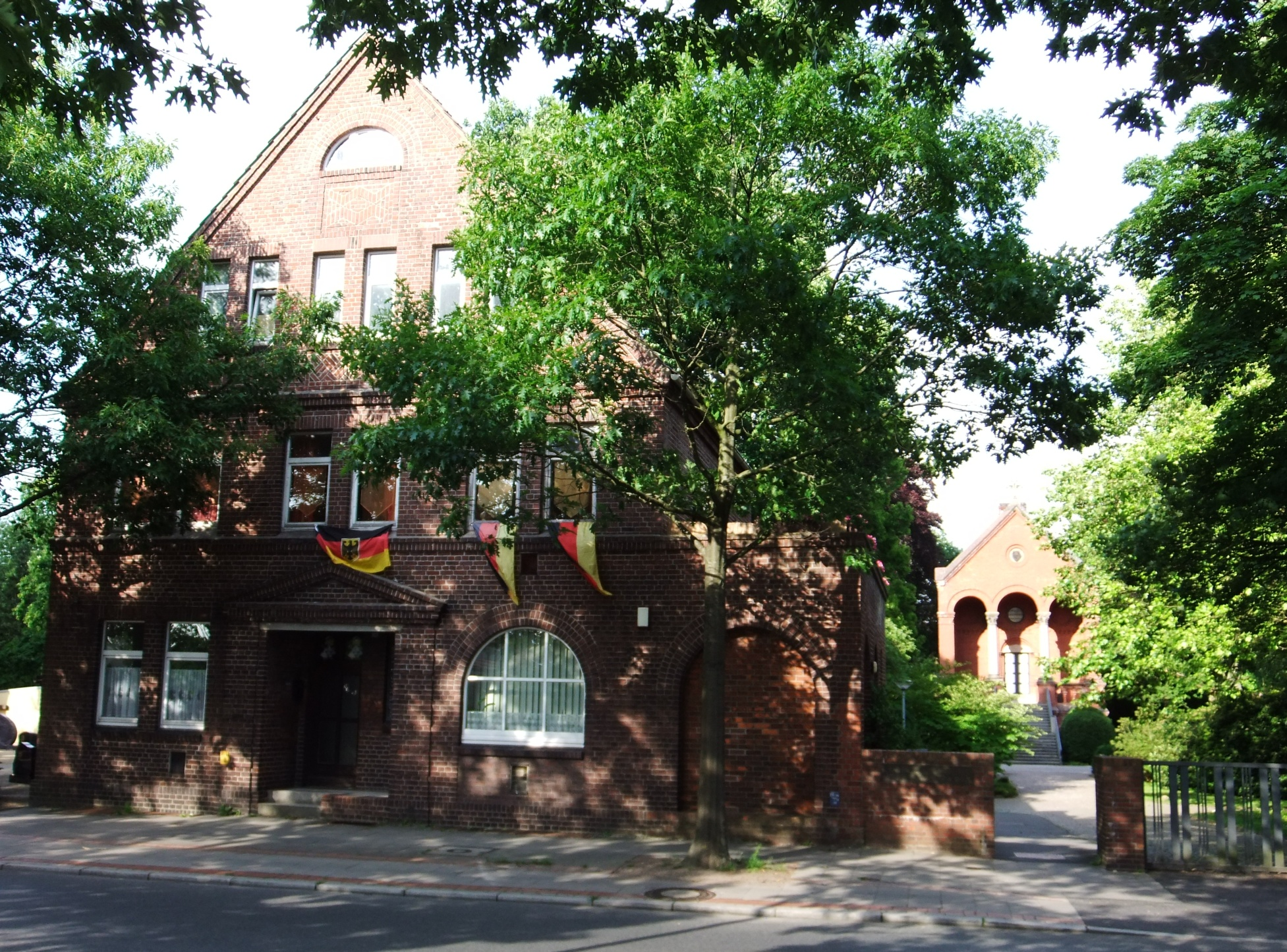 Wulsdorfer Friedhof in Bremerhaven, Weserstraße 169. Die Gesamtanlage ist ein geschütztes Kulturdenkmal in der Freien Hansestadt Bremen, mit der Nr. 3388 beim Landesamt für Denkmalpflege registriert.